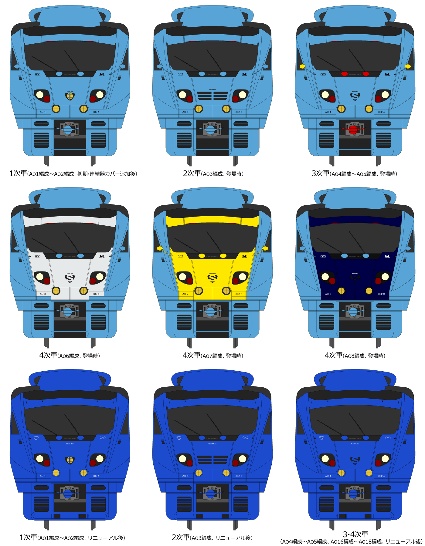 JR九州883系電車： 各編成、登場時とリニューアル後の正面図